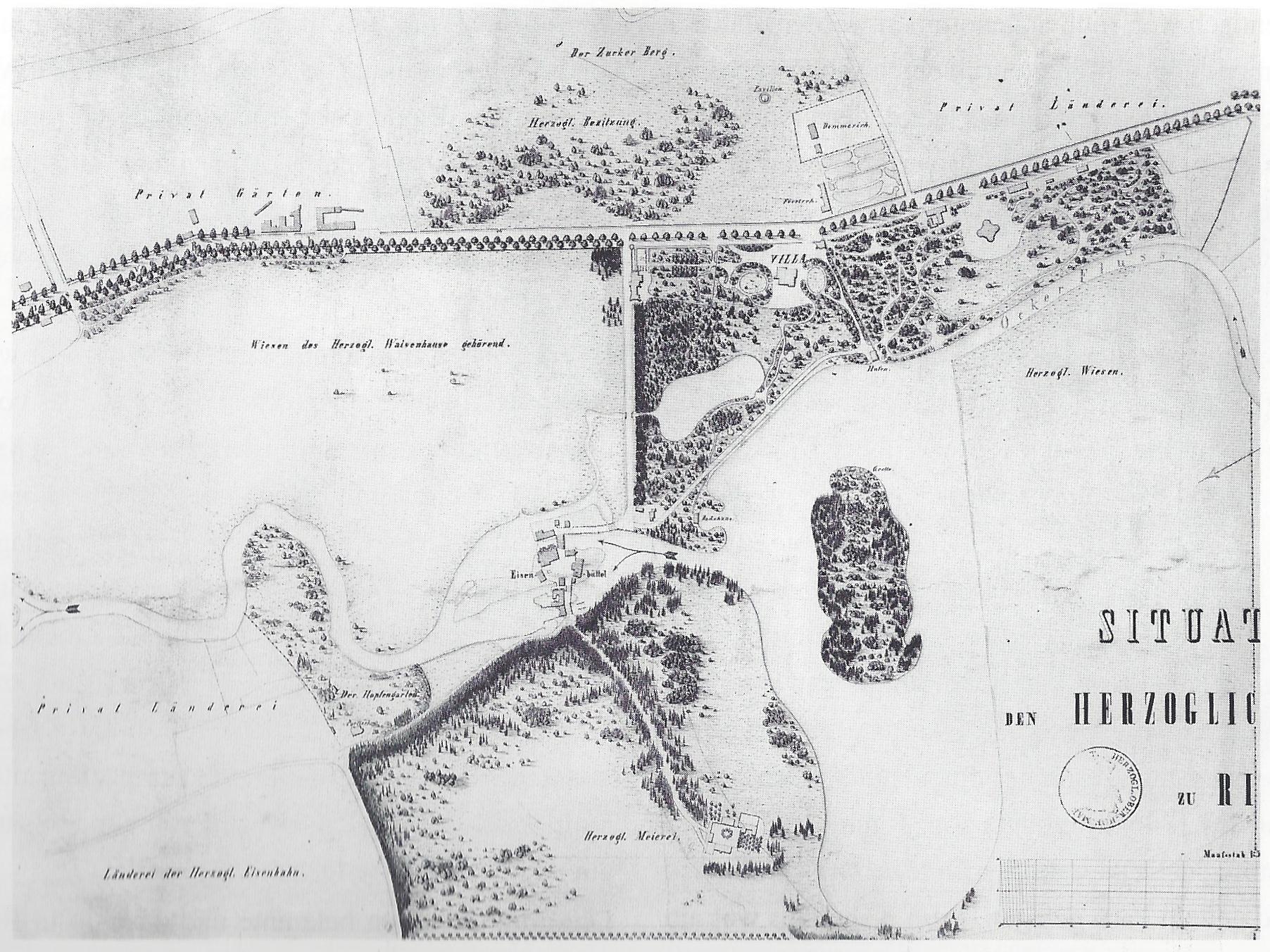 Situationsplan von den herzoglichen Besitzungen zu Richmond, Ausschnitt, Fundstelle: Heinz-Joachim Tute, Gert-Dieter Ulferts:Richmond - Bilder aus 225 Jahren Geschichte, Joh. Heinr. Meyer Verlag, Braunschweig 1993